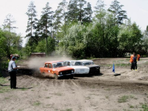 Момент из соревнований по автокроссу на трассе Автомотоцентра